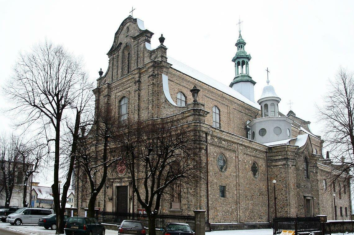 Kościół św. Bartłomieja, widok z placu Kościuszki czyli tutejszego rynku